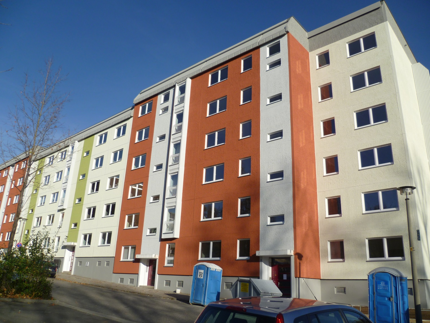 Sonnenberg - Sanierter Plattenbau in der Paul Arnold Straße, 2012